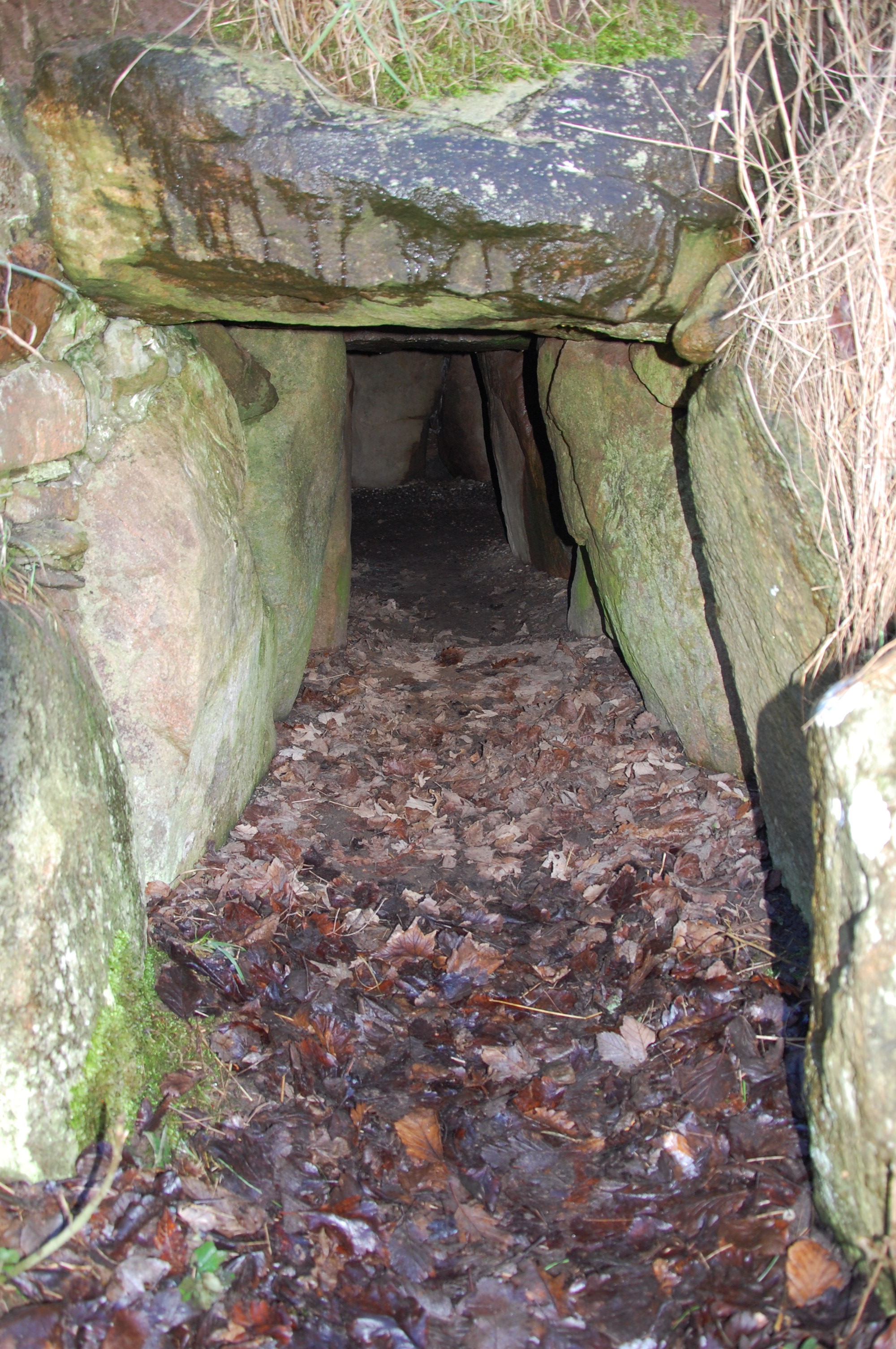 Troldstuerne Gang